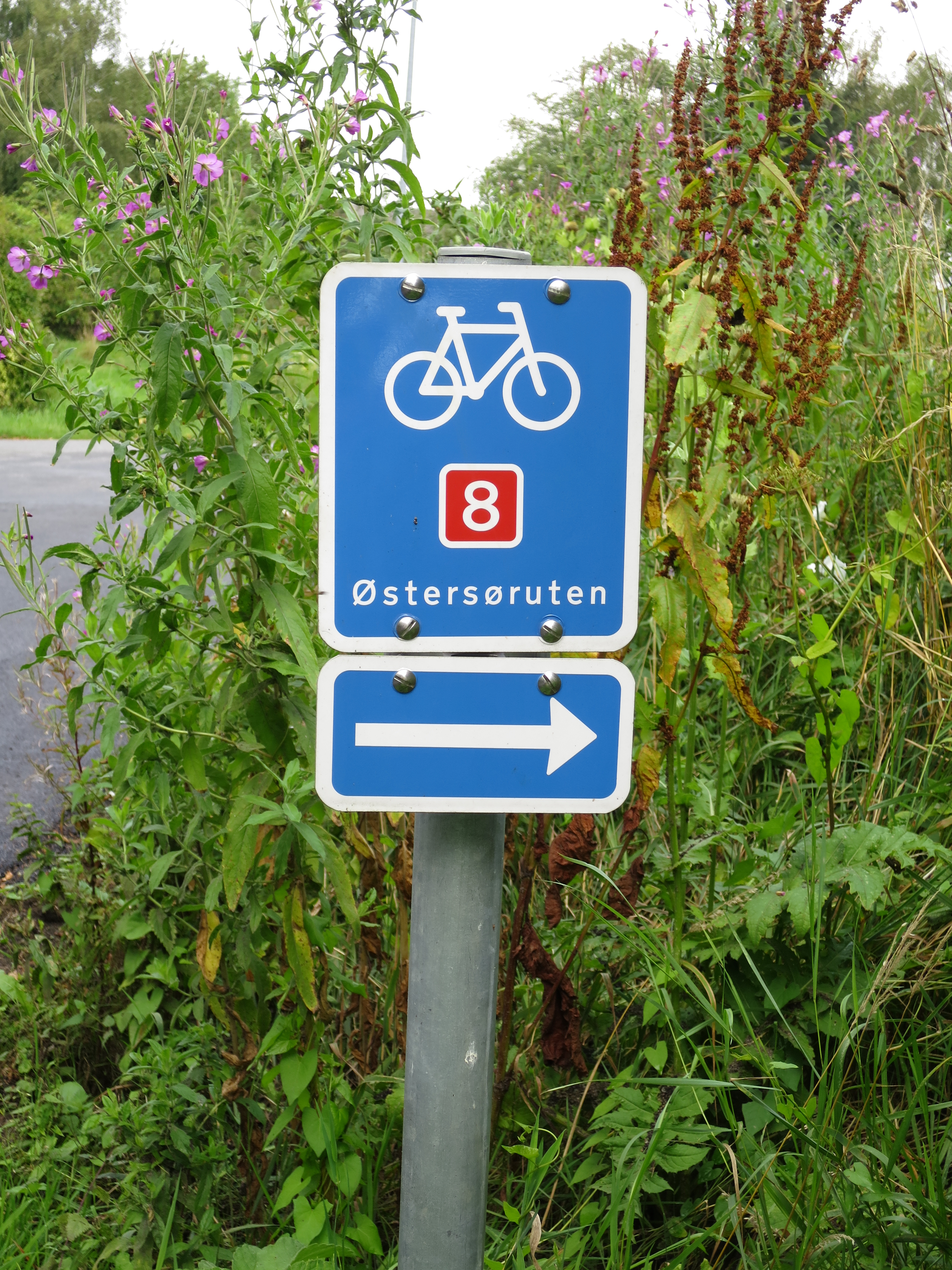 Skiltning af cykelruten Østersøruten (N8)